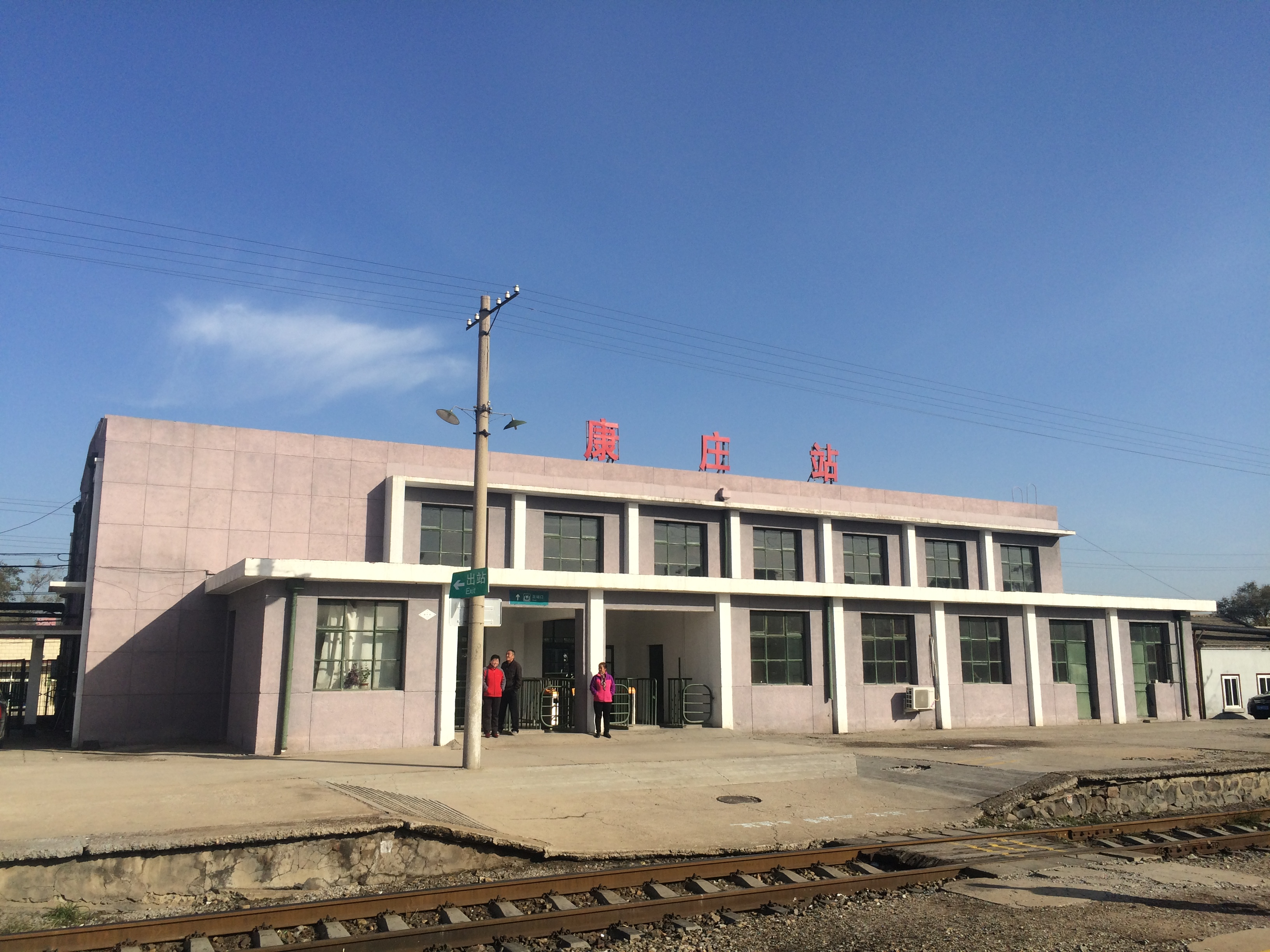 康庄站站房，摄于2016年10月29日。